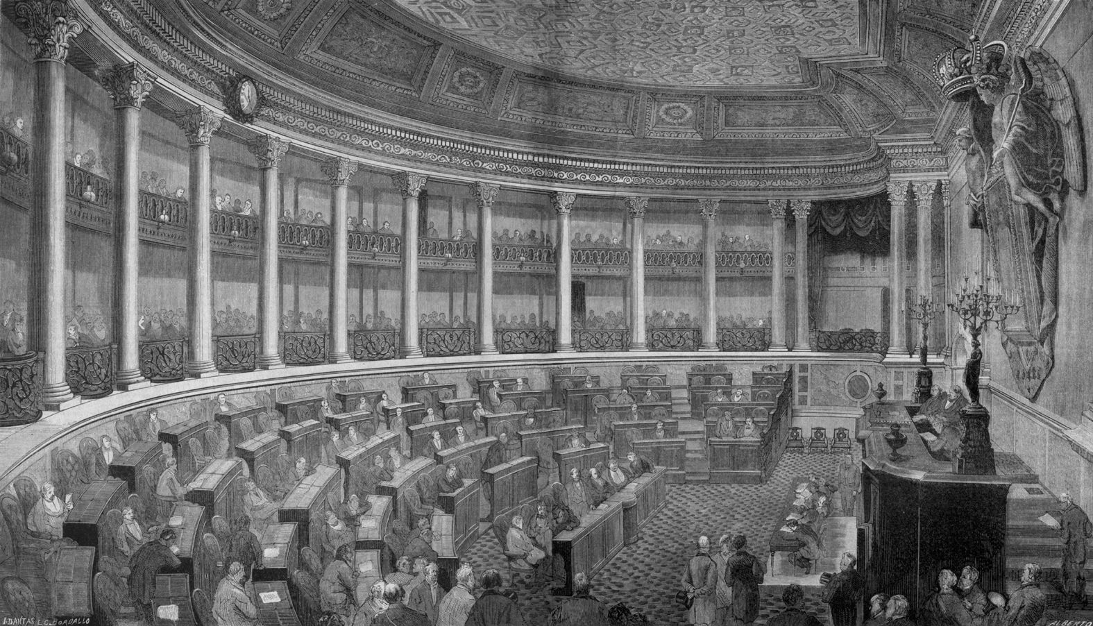 A Nova Câmara dos Pares. Desenho sobre fotografia de Francisco Rocchini, gravado por Caetano Alberto.